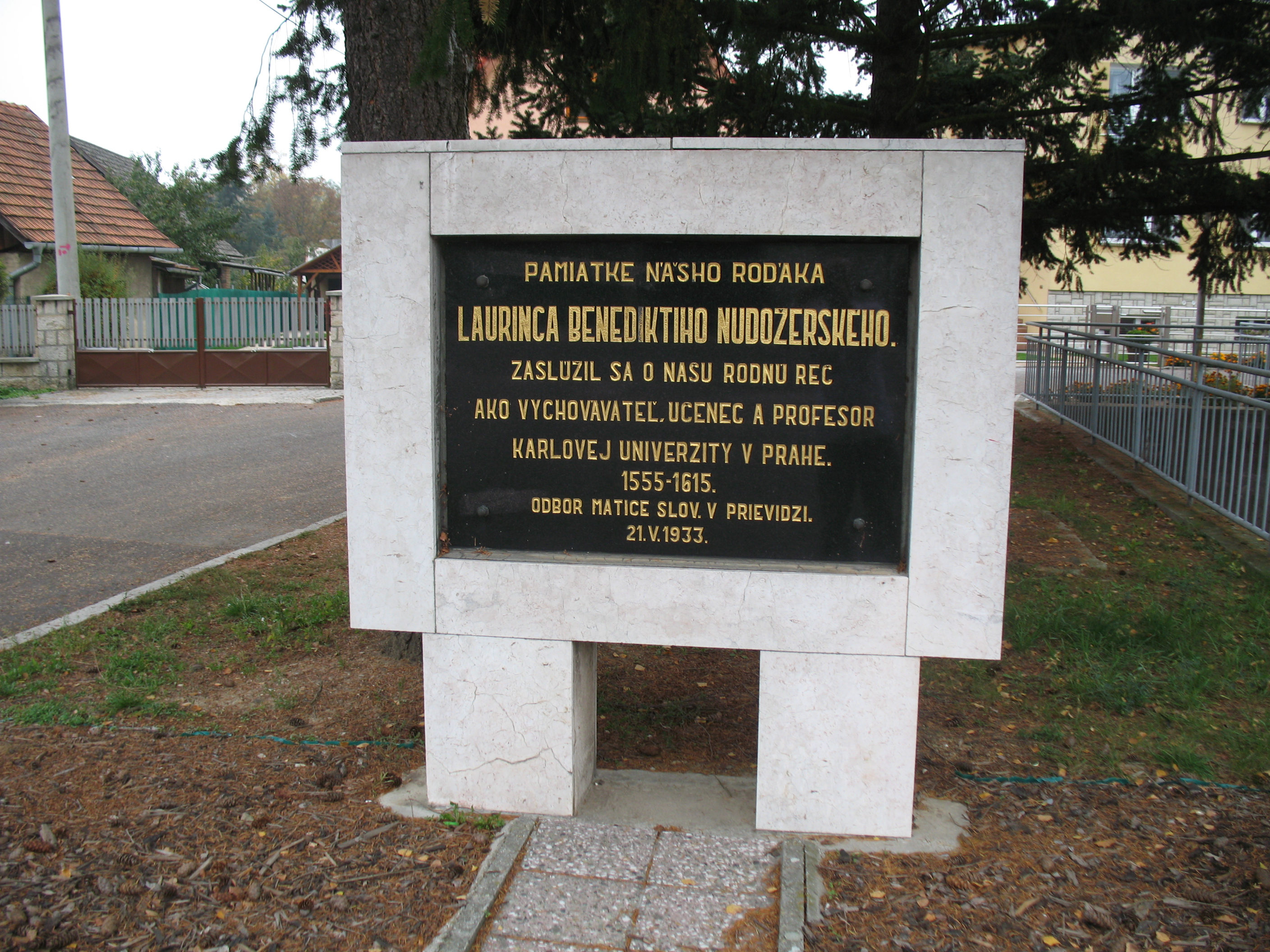 Nádasérberzseny